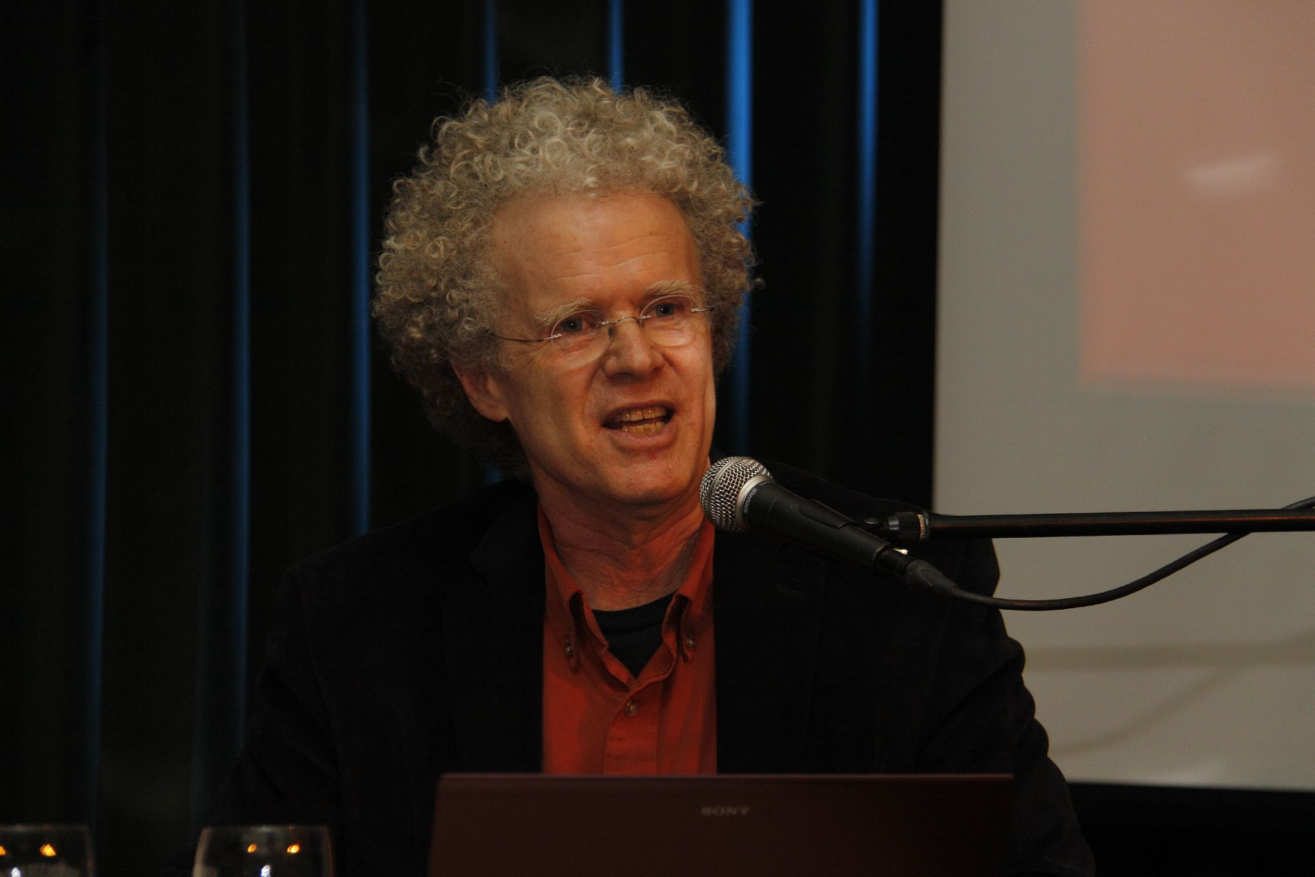 «Luxemburg Lecture» mit Erik Olin Wright, Berlin, 17.5.2011 Erik Olin Wright, geb. 1947 in Berkeley, Kalifornien (USA), lehrt als Professor für Soziologie an der University of Wisconsin-Madison. Seine Arbeitsschwerpunkte sind marxistische Klassentheorie; Kapitalismusanalyse und Transformationsforschung.